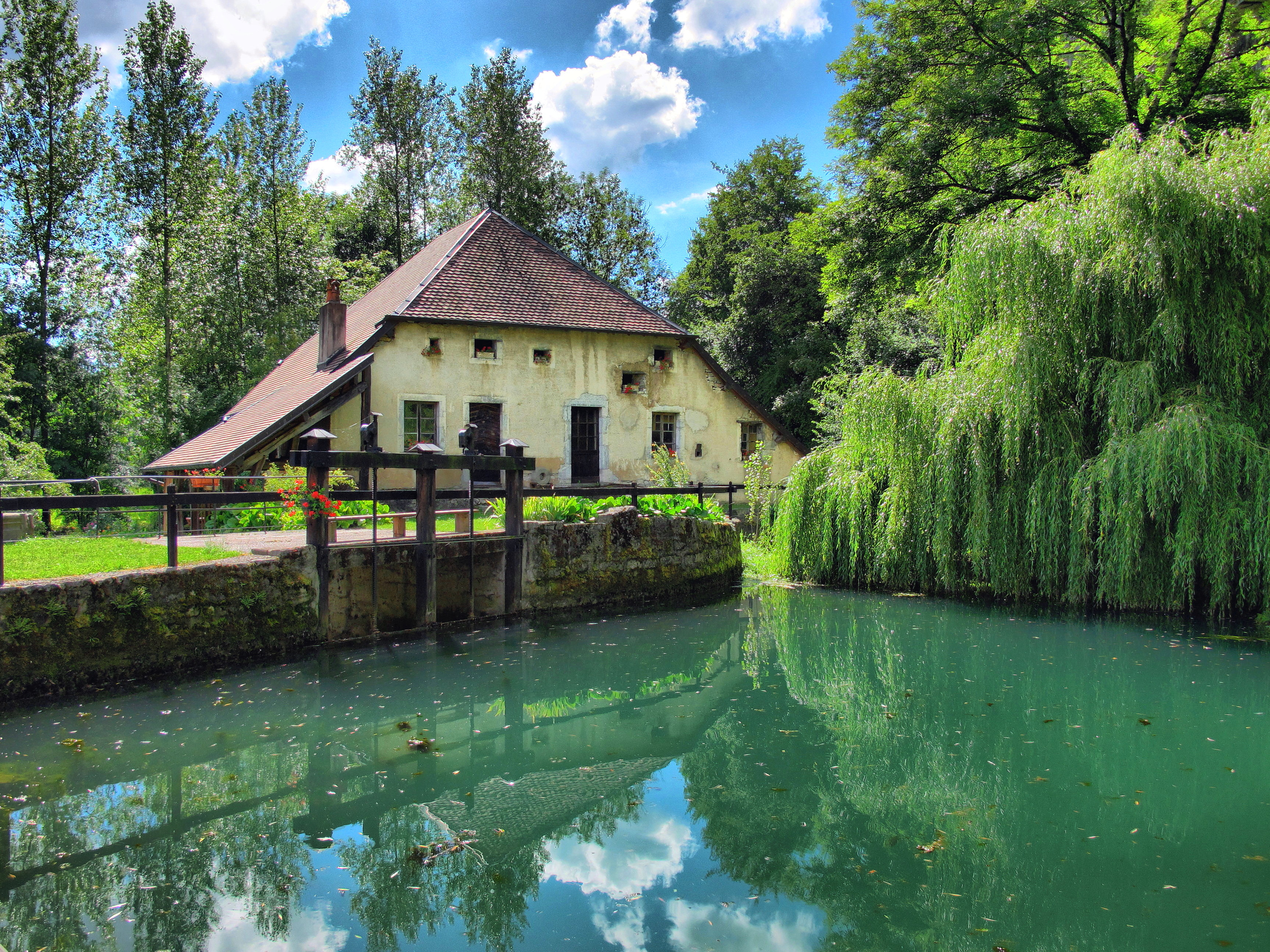 Le moulin de Fourbanne